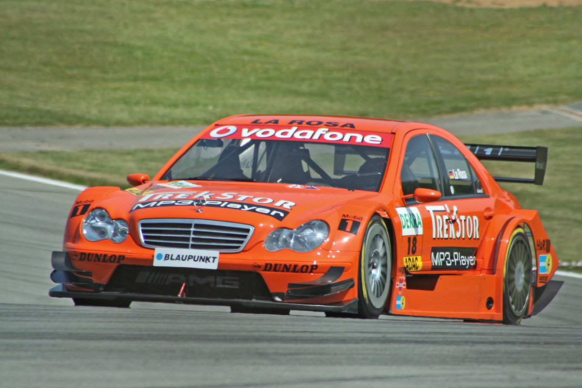 Daniel la Rosa driving for Mercedes-Benz in the 2006 Deutsche Tourenwagen Masters season.